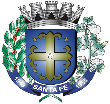 Brasão de Armas do município de Santa Fé, Paraná, Brasil.